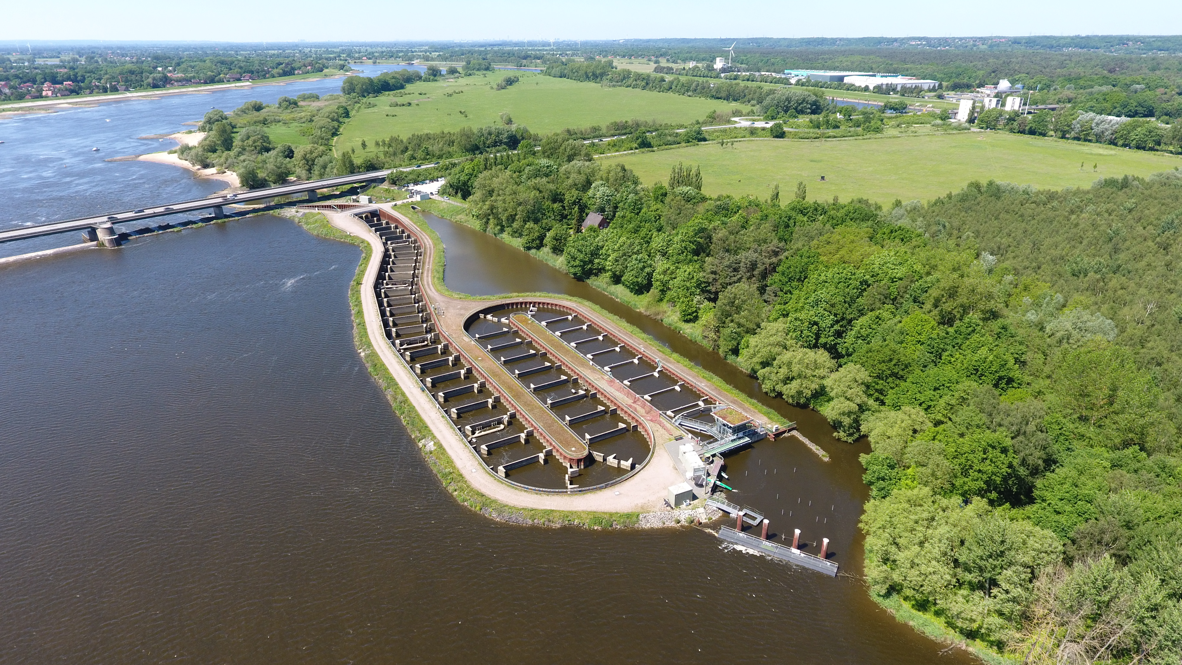 Die Luftbildaufnahme zeigt die größte Fischtreppe Europas, welche sich an der Staustufe Geesthacht in der Elbe bei Geesthacht befindet.